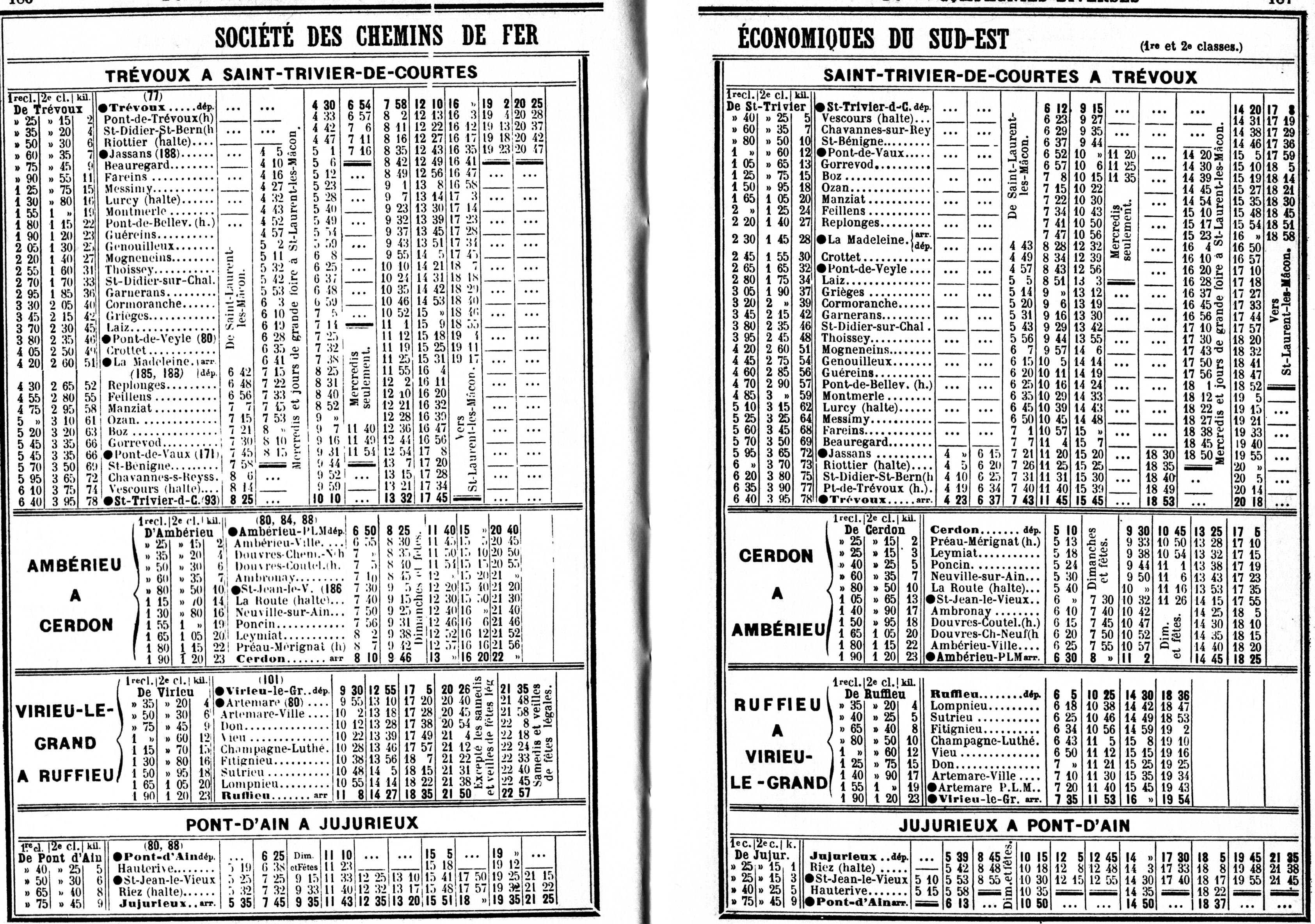 Indicateur Chaix des chemins de fer - Mai 1914 Compagnie des Chemins de fer économiques du Sud-Est Lignes Trévoux - Saint-Trivier de Courtes, Ambérieux à Cerdon, Virieu le Grand à Ruffieu, Pont d'Ain à Jujurieux